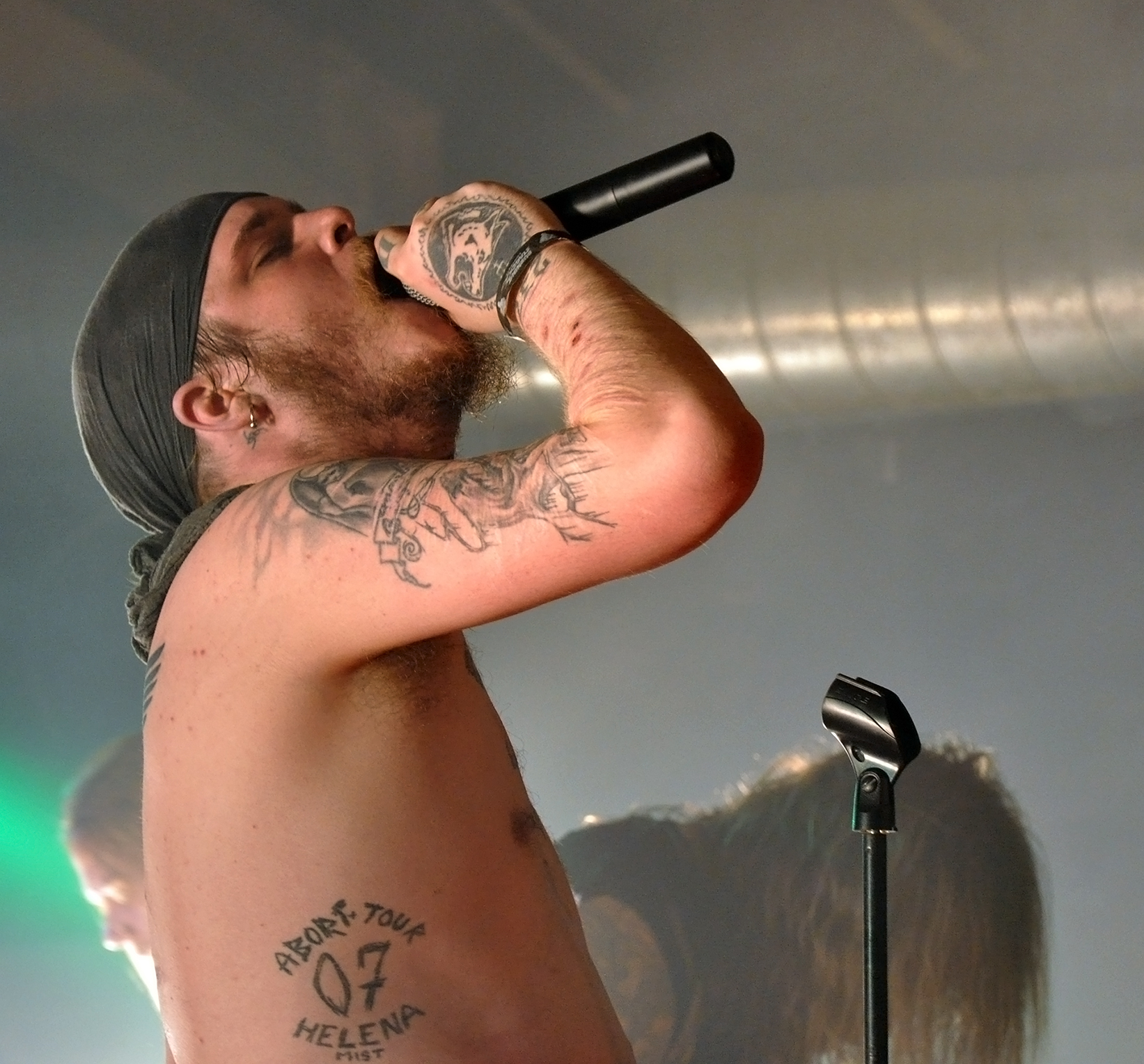 Kvarforth, le chanteur de Shining, à la Satan's Convention, à Osnabrück (Allemagne), le 3 Décembre 2011.